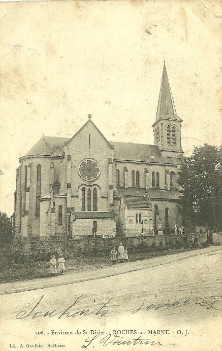 L'église.